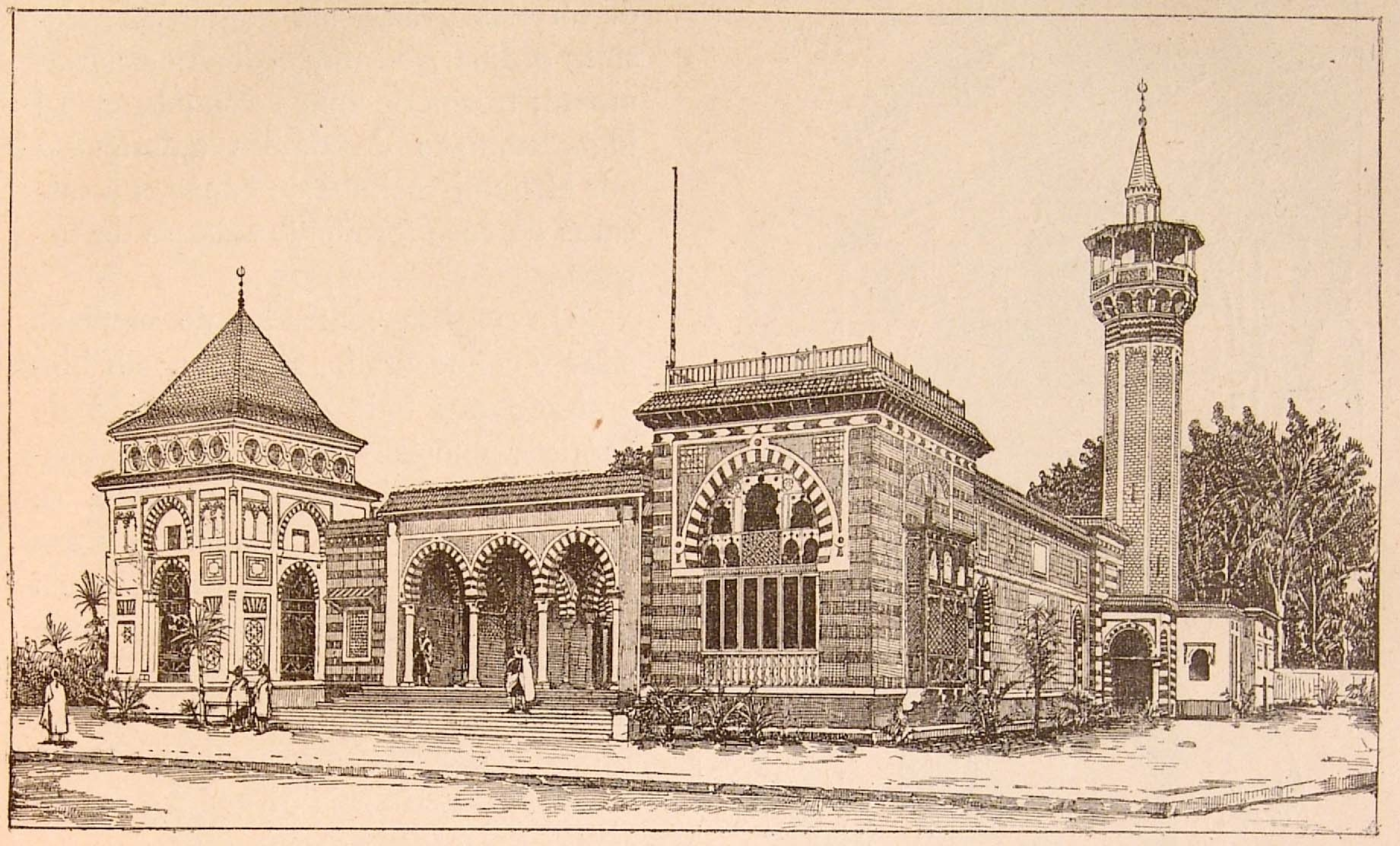 1El palacio de Túnez.